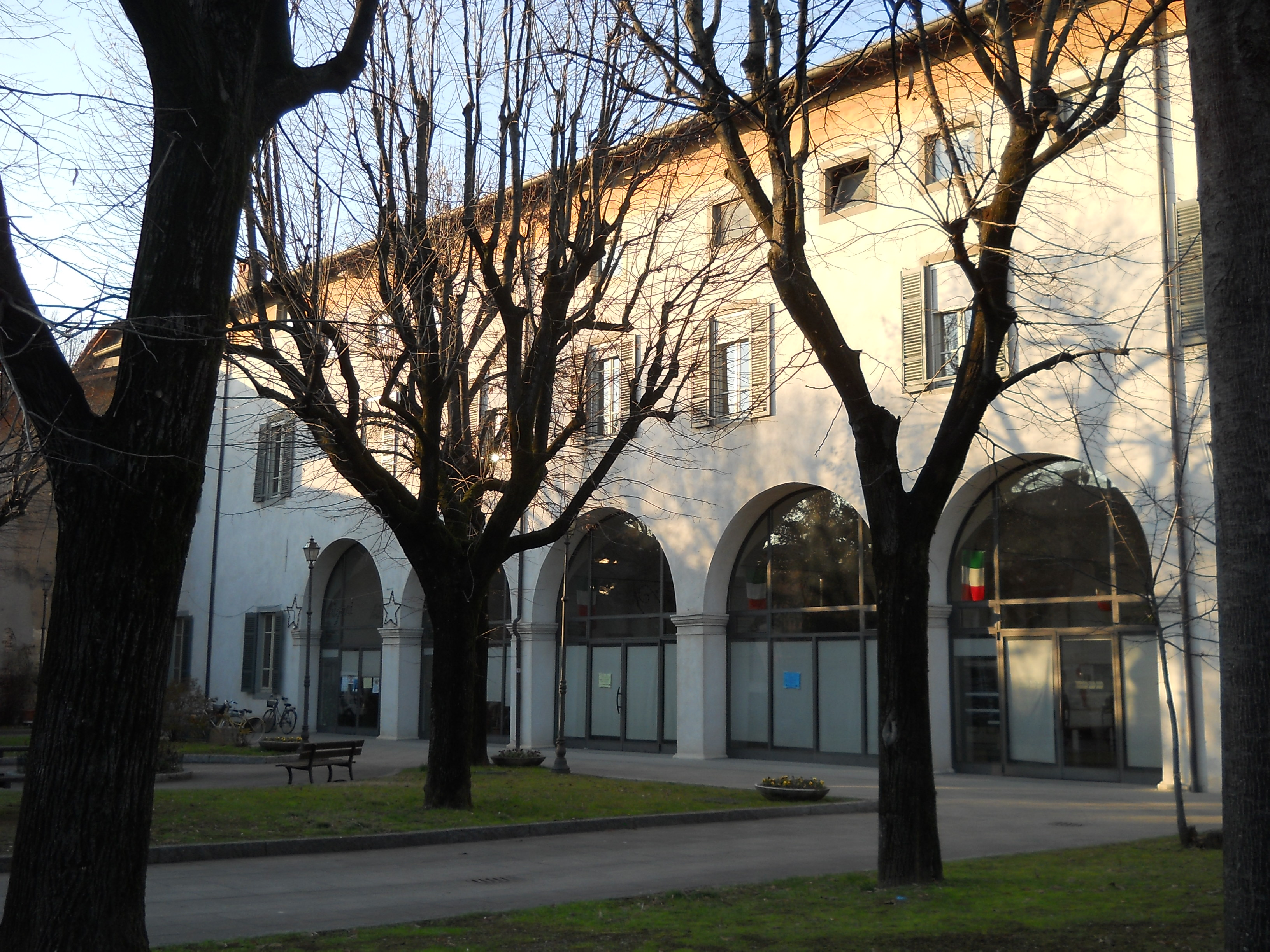 Palazzo Benaglio, sede del municipio, Comun Nuovo, Bergamo, Italia